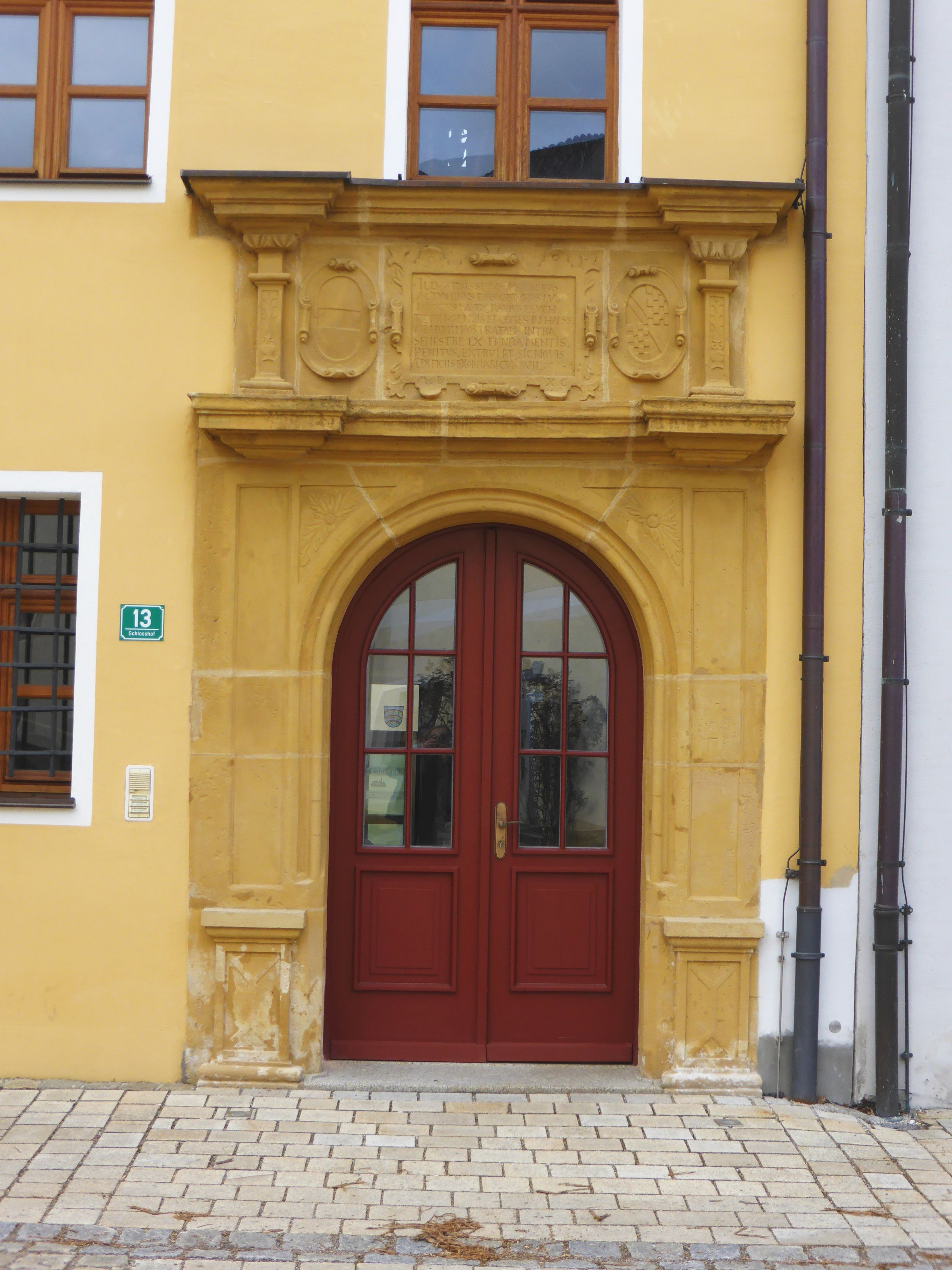 Pfreimd_(Schlosshof_13) Renaissanceportal des Leuchtenbergischen Schlosses